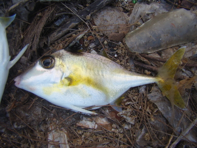 Triacanthus nieuhofii, location: India - Dayanand Bandodkar Marg, Santa Inez, Panjim, Goa